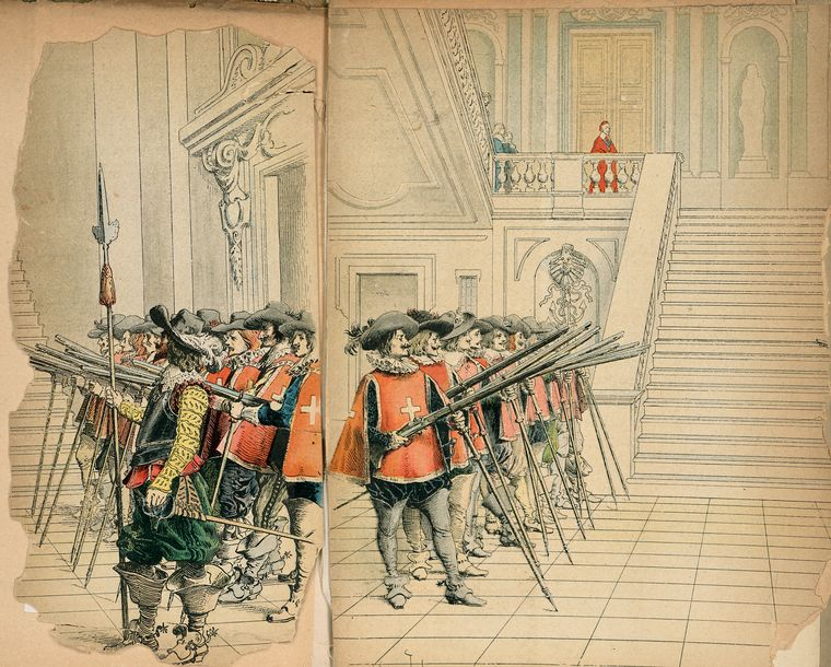 Гвардейцы кардинала Ришелье